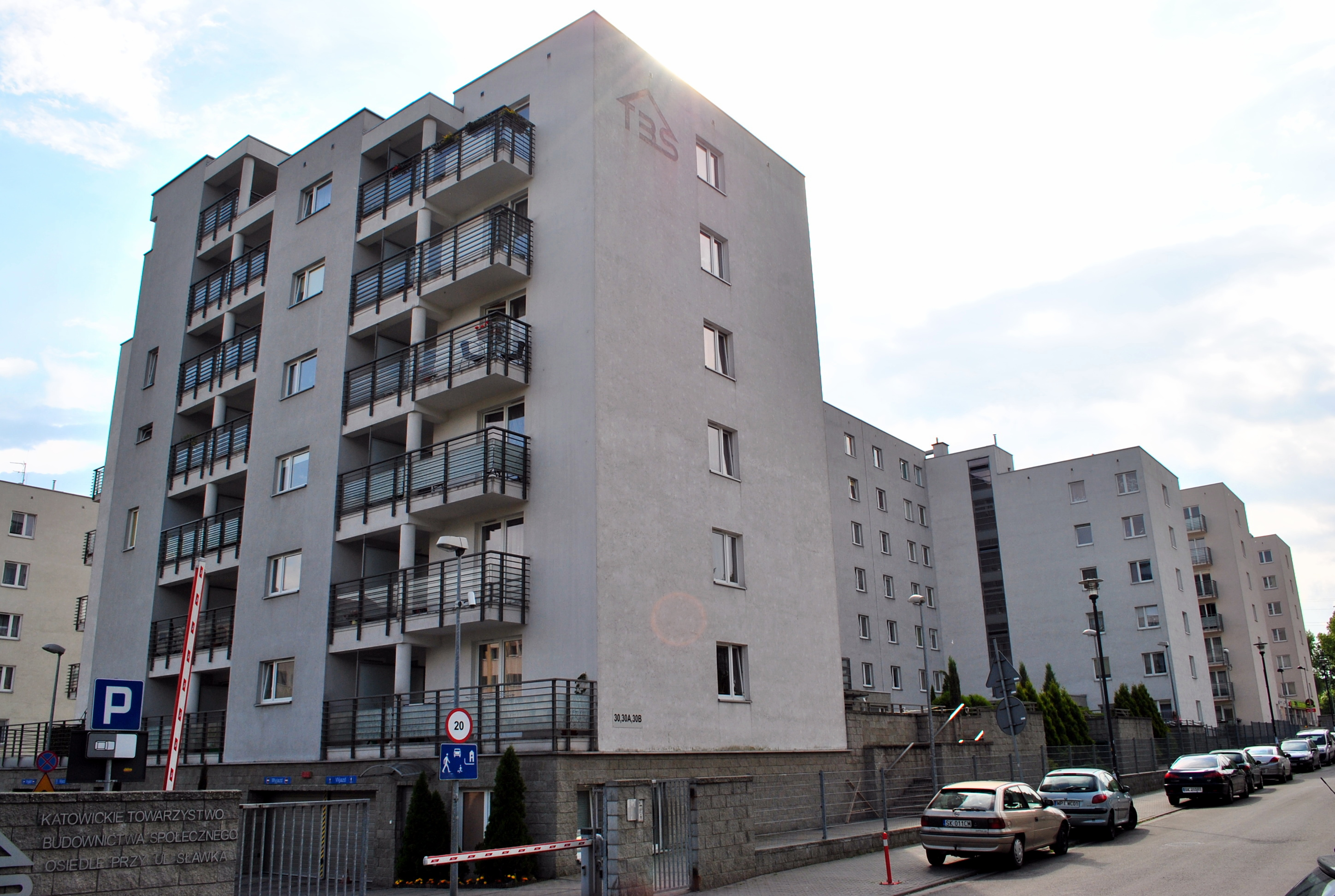 Katowice - Osiedle Witosa. Budynki mieszkalne towarzystwa budownictwa społecznego przy ul. Sławka